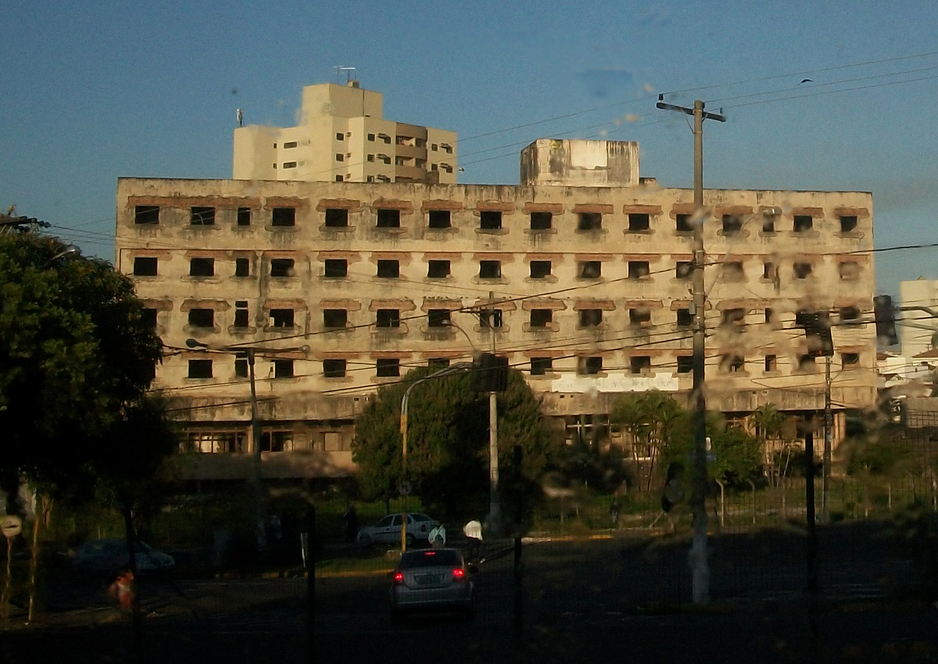 Obra do elefante branco Hospital Modelo de Araçatuba em 2011. Iniciada na década de 70, chegou até a funcionar. Obra de iniciativa privada, passou ao Estado e posteriormente para a Prefeitura. Foi demolido após décadas na gestão do prefeito Cido Sério em 12 de outubro de 2013